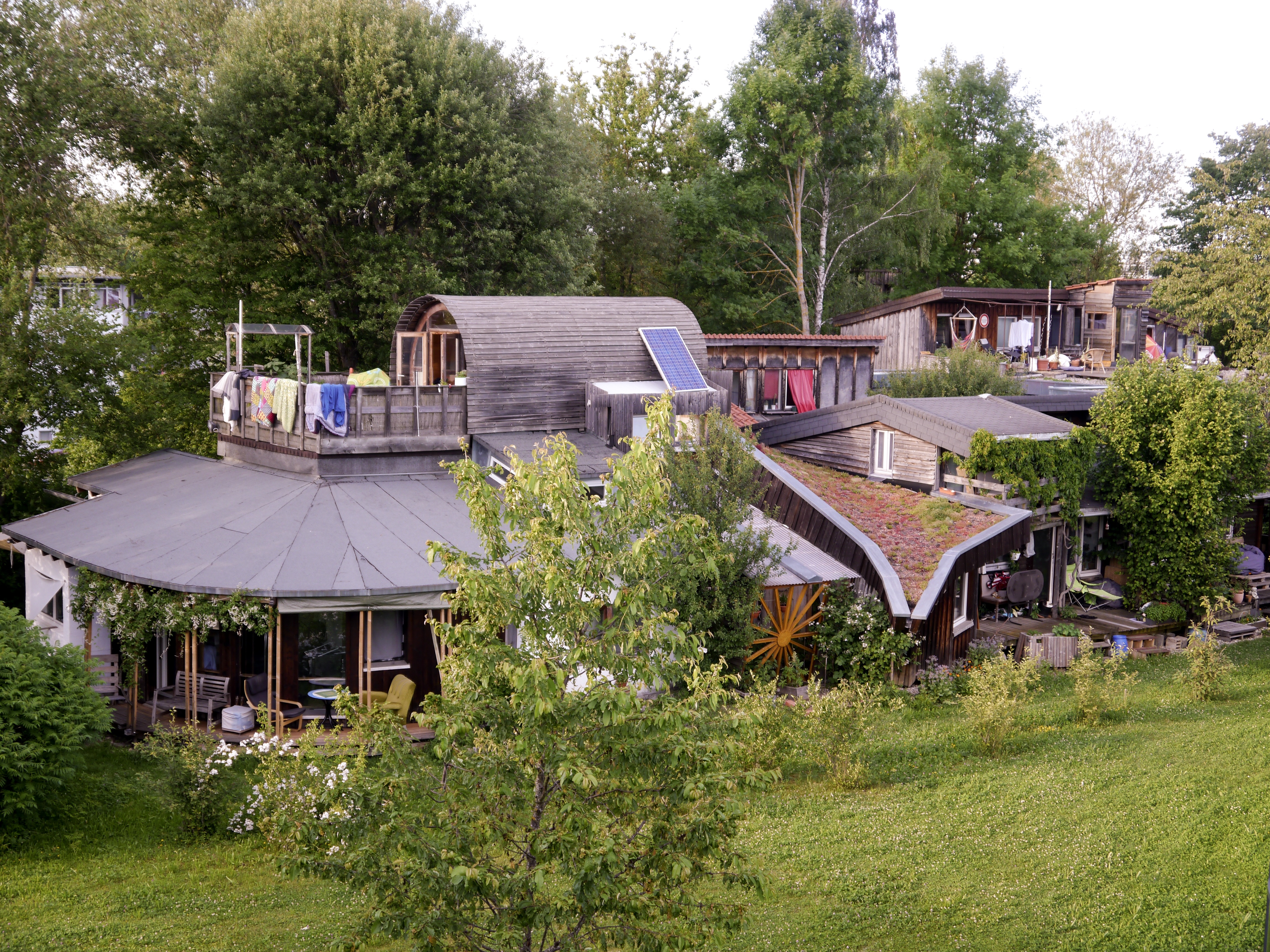 Bauhäusle, Studierendenwohnheim in Stuttgart-Vaihingen, im Juni 2017